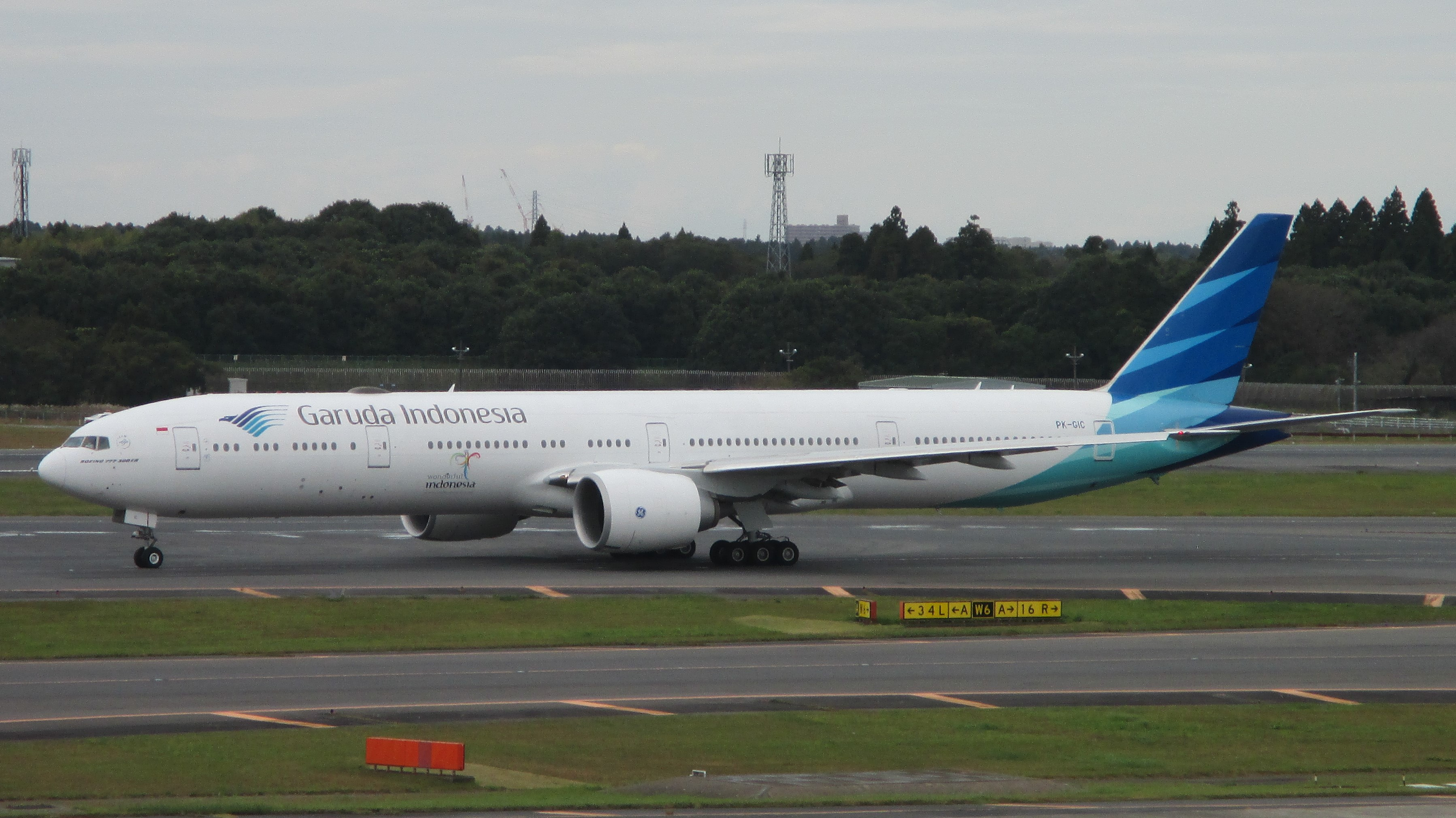 成田国際空港で撮影。